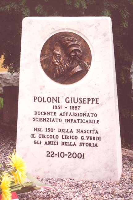 Cippo sulla tomba del fisico Giuseppe Poloni